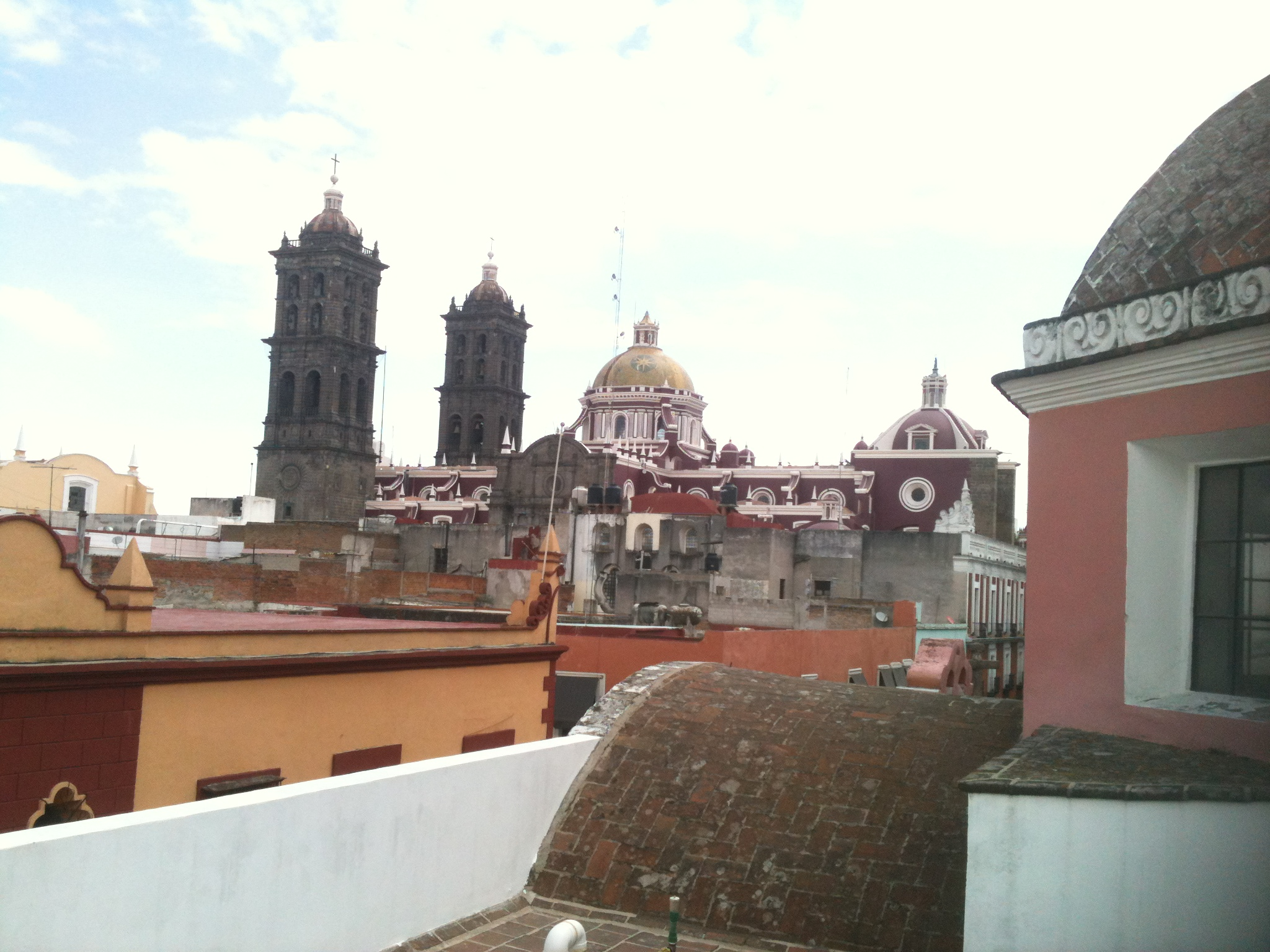 Vista de la Catedral de Puebla desde la terraza del Museo Amparo